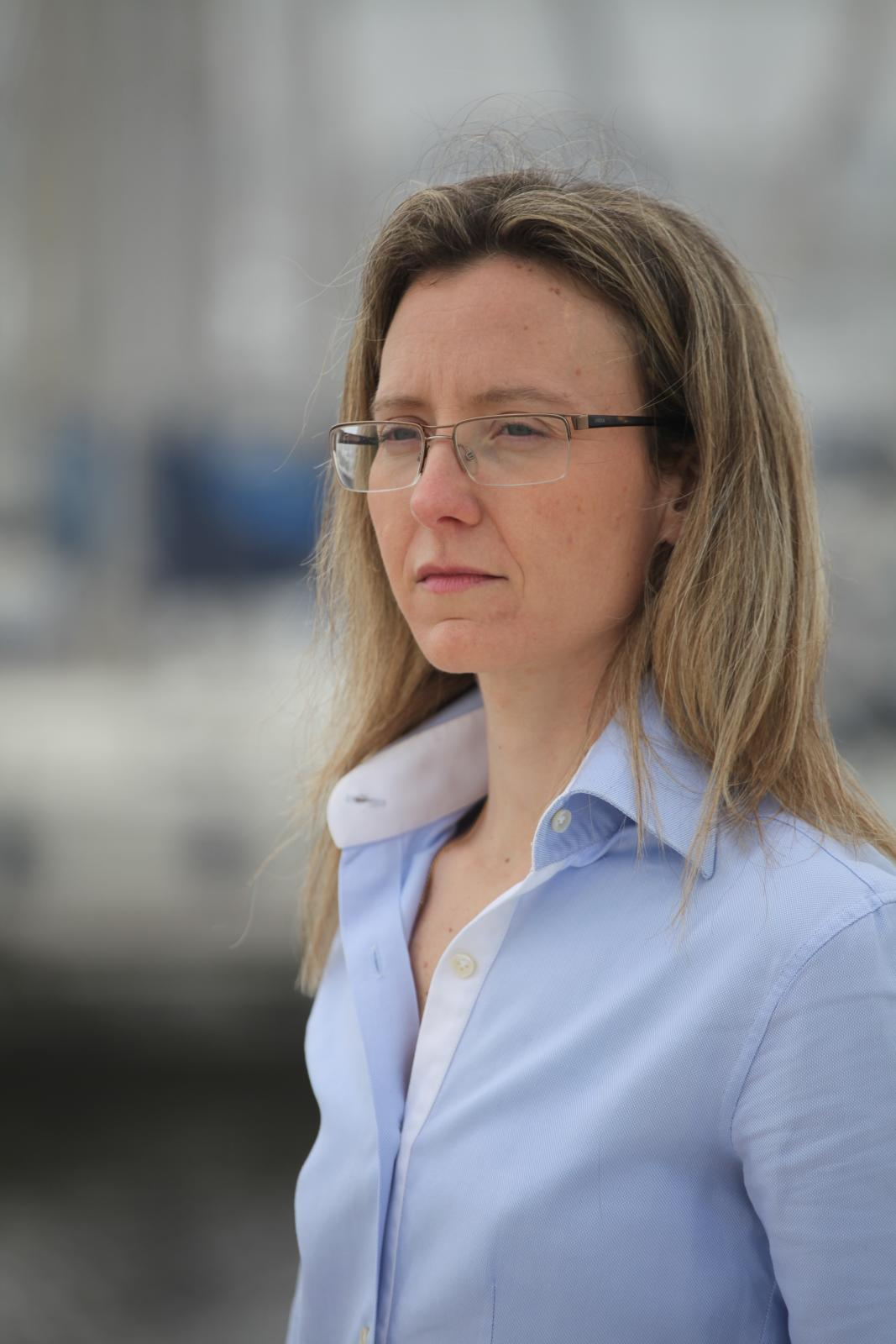 La scrittrice Elena Torre